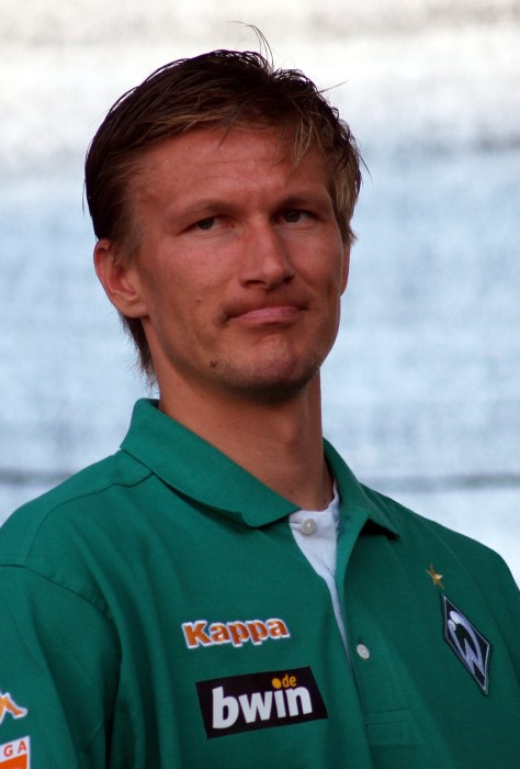 Jurica Vranjes beim Tag der Fans